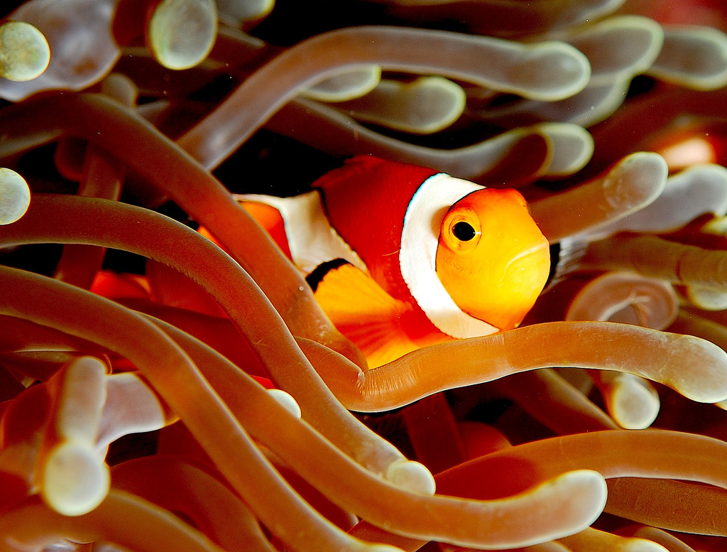 'nemo' On Black